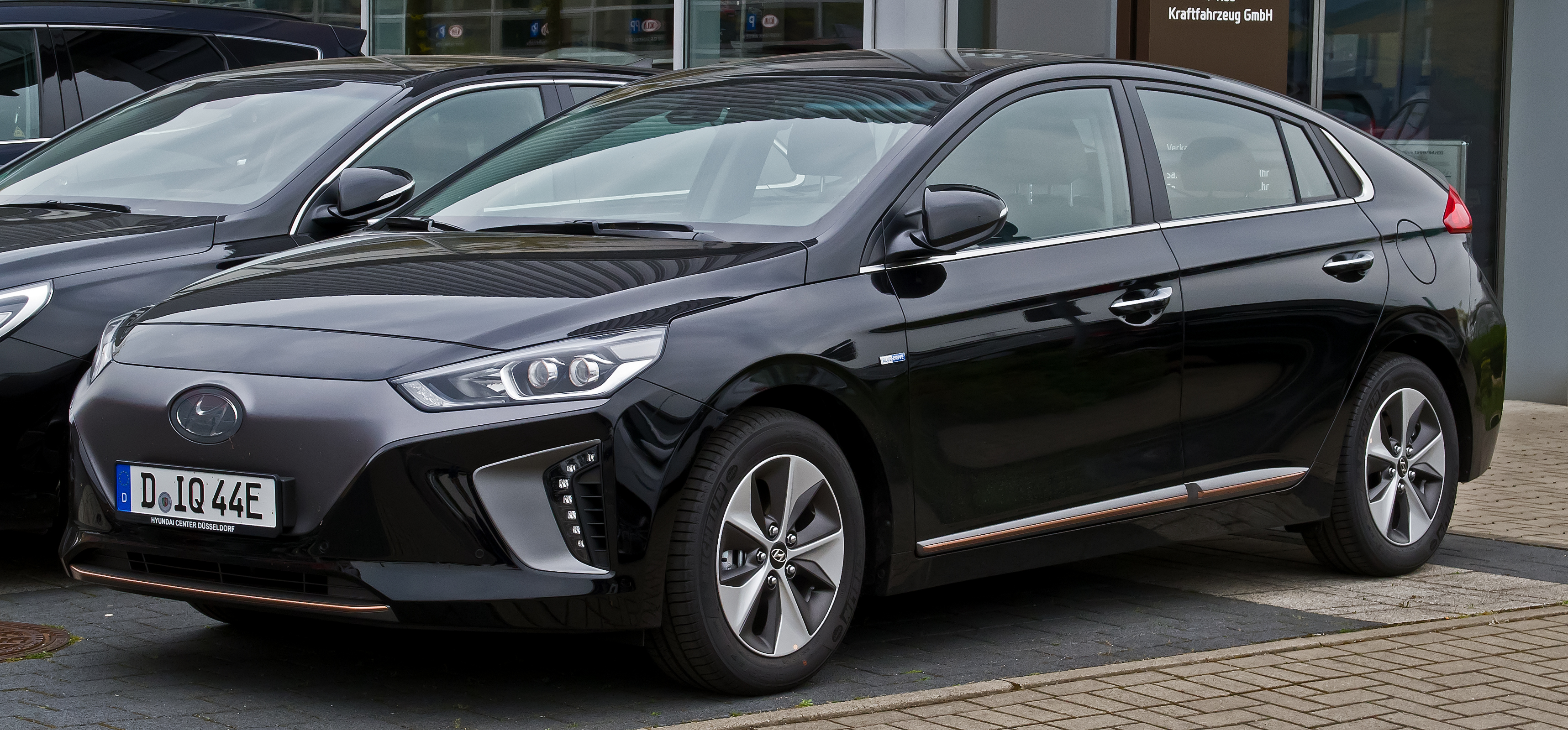 Hyundai IONIQ electric Premium